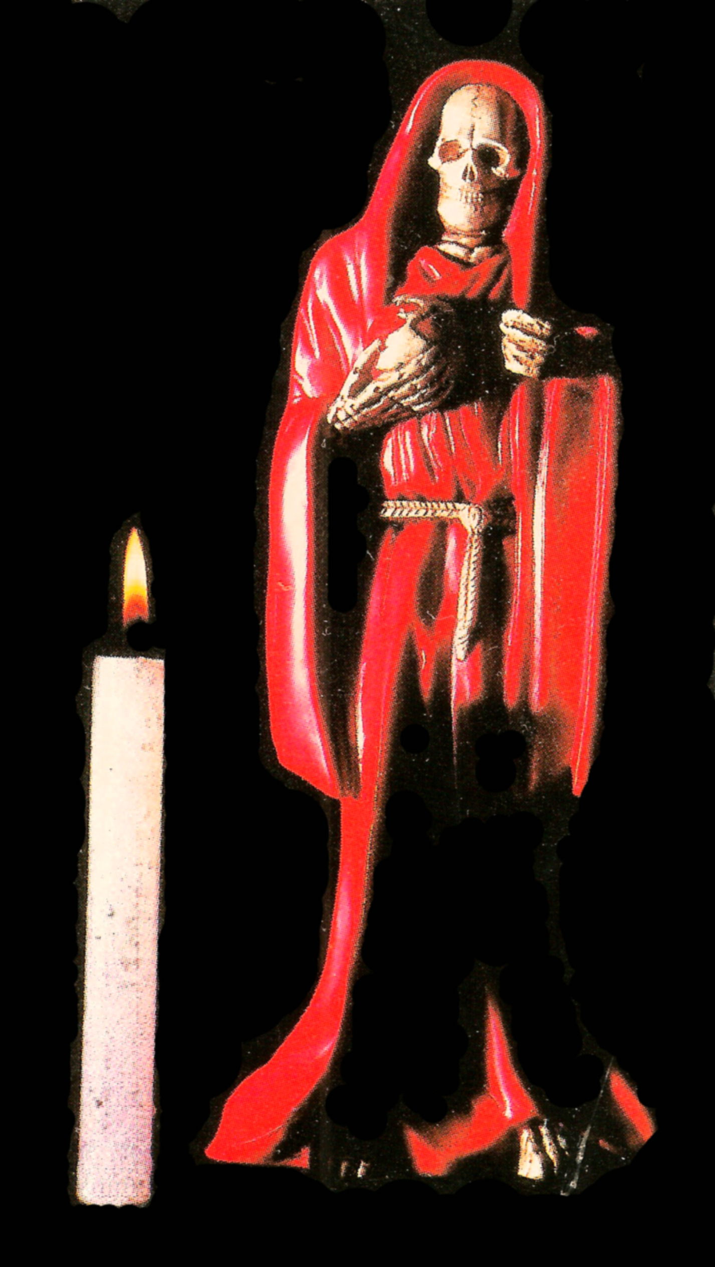 Santisima Muerte Estampita